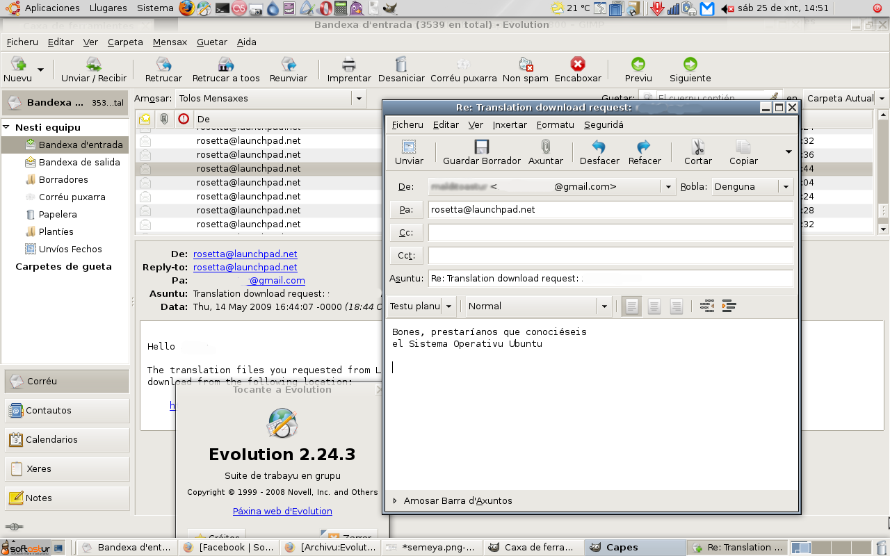 Captura de pantalla d'Evolution n'asturianu